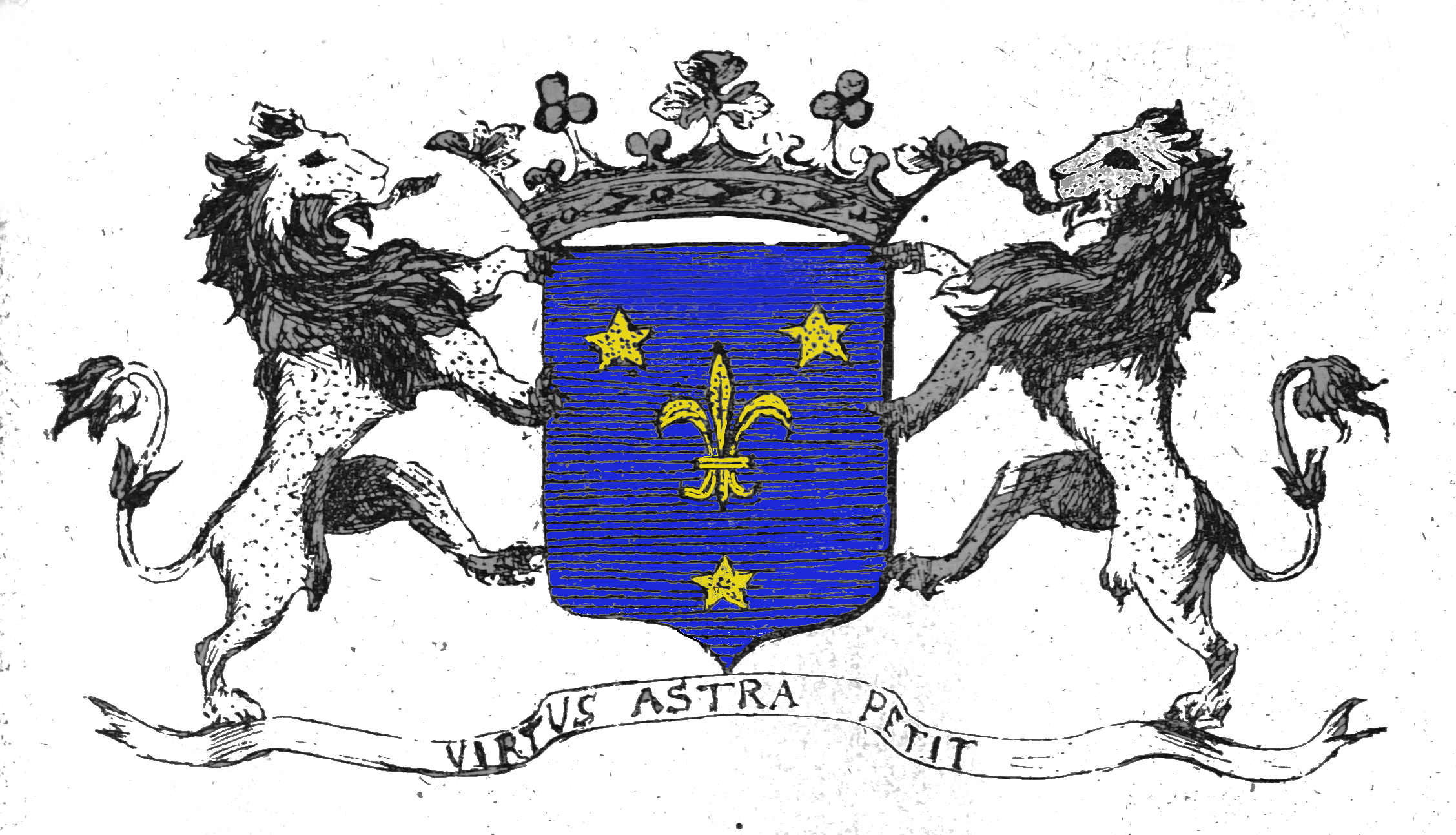 de la famille d'arfeuilles